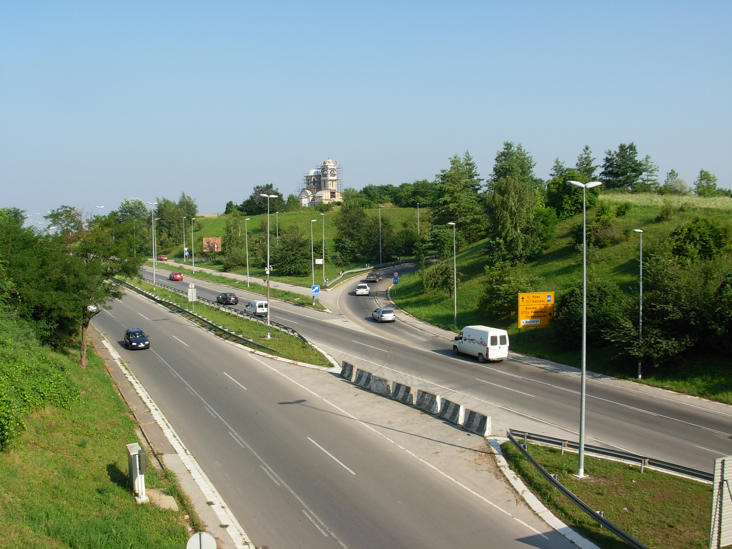 Dálnice nedaleko od Mišeluku v Novém Sadu, Vojvodina, Srbsko. V pozadí se buduje malý pravoslavný kostel